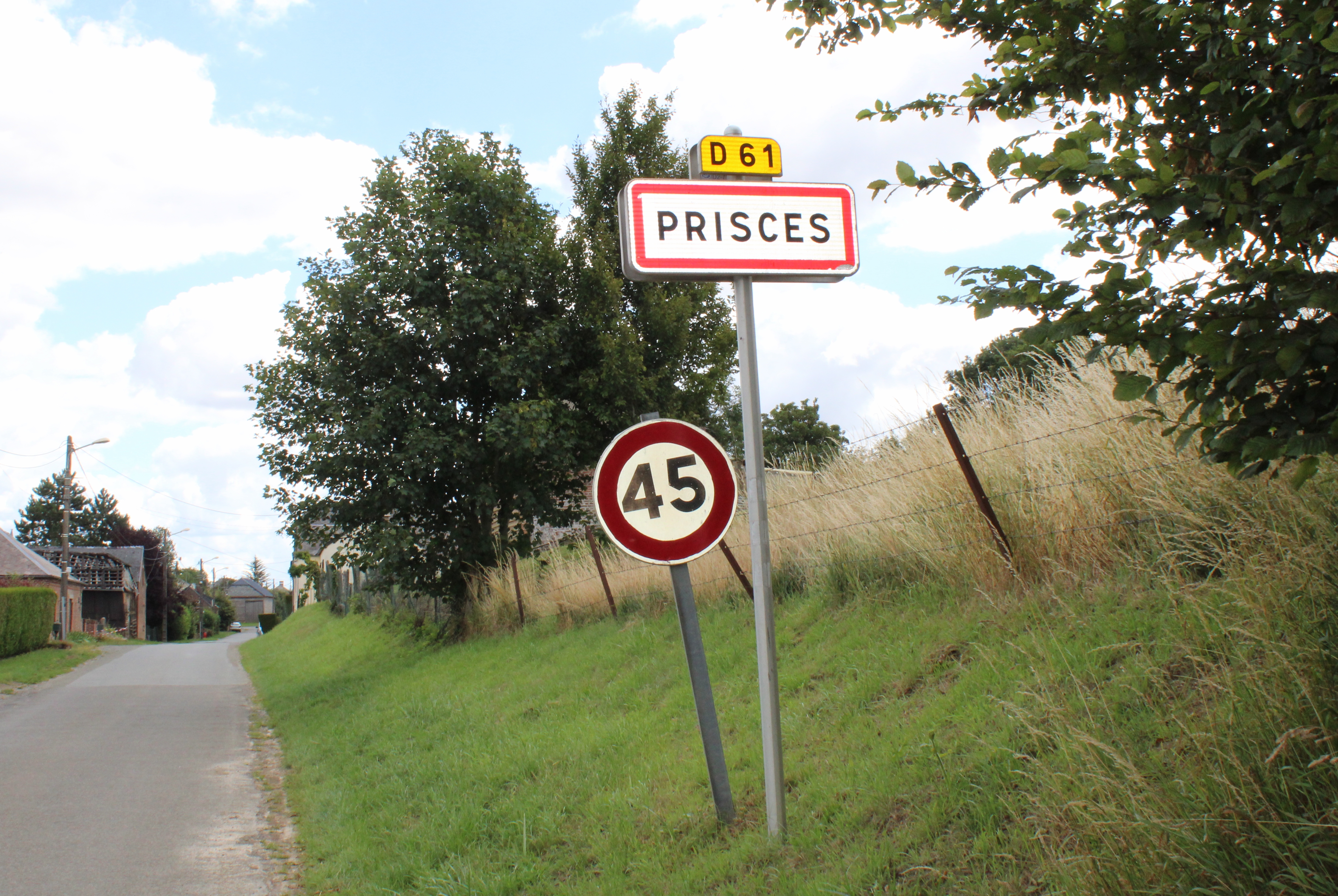 Entrée du village